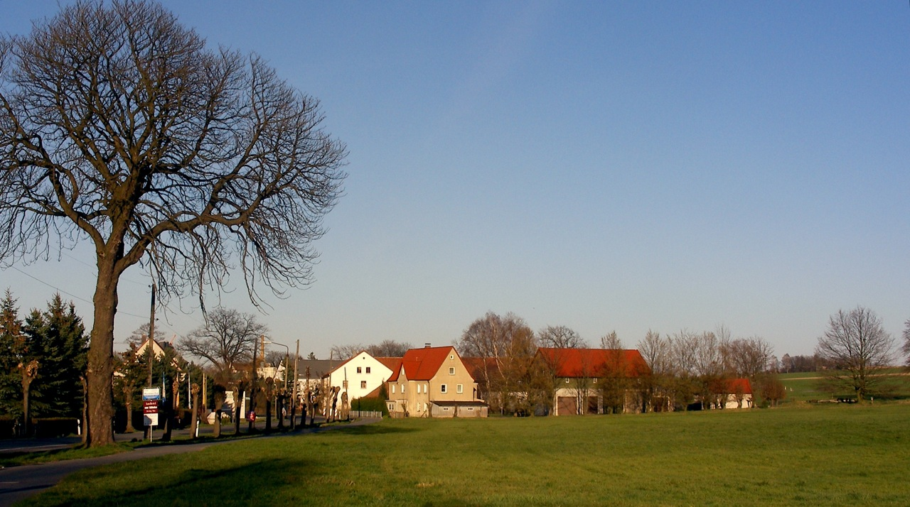 Ortseinfahrt Großröhrsdorf